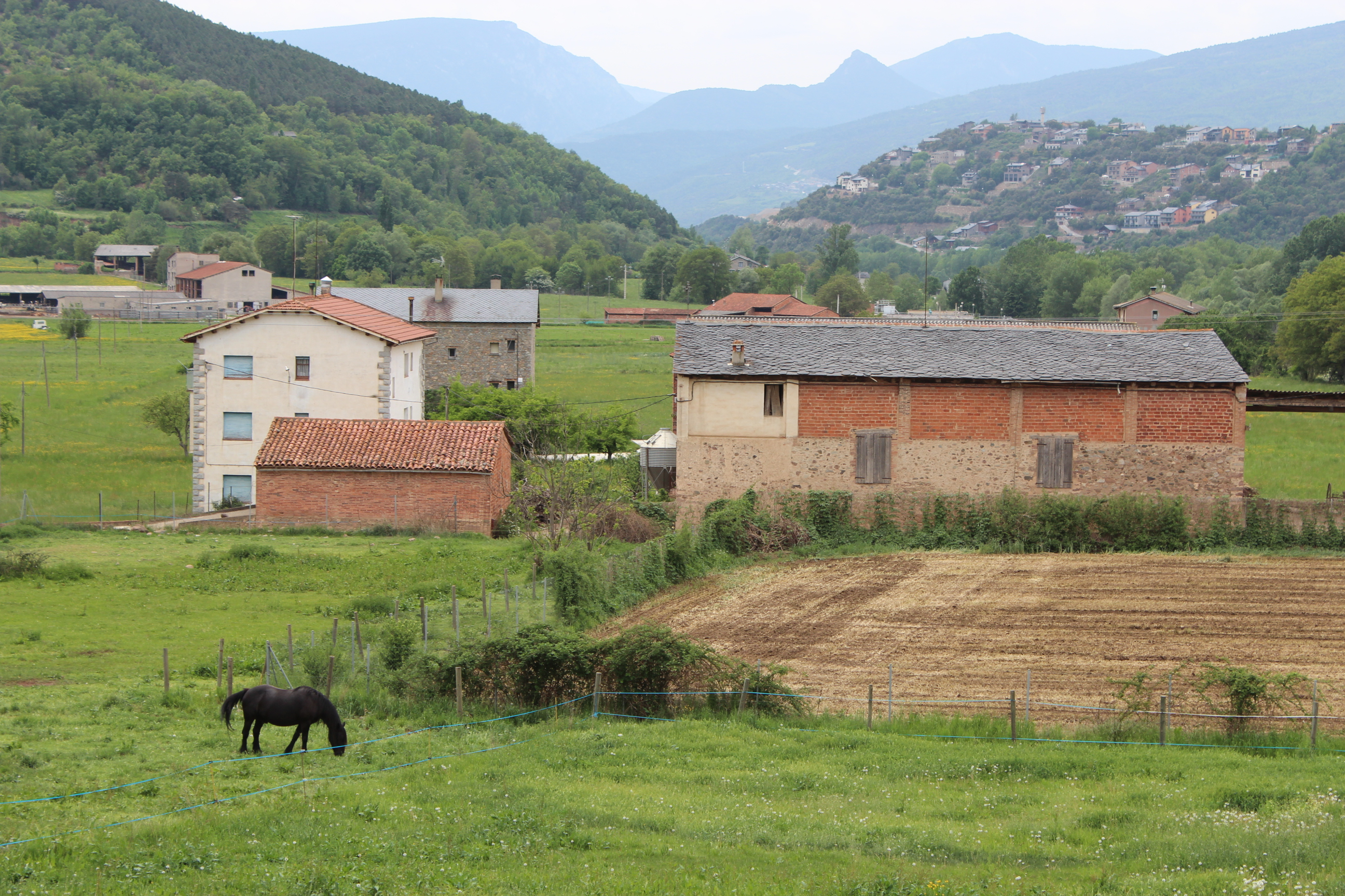 Cal Pinell, partida de Segalers al municipi de la Seu d'Urgell